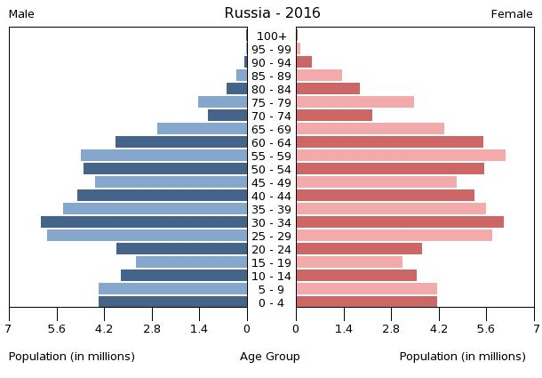 Russland Bevölkerungspyramide